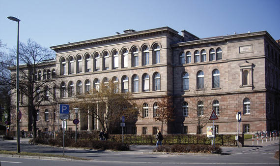 Zoologisches Institut, Universität Göttingen, Februar 2011. Foto: F. Welter-Schultes